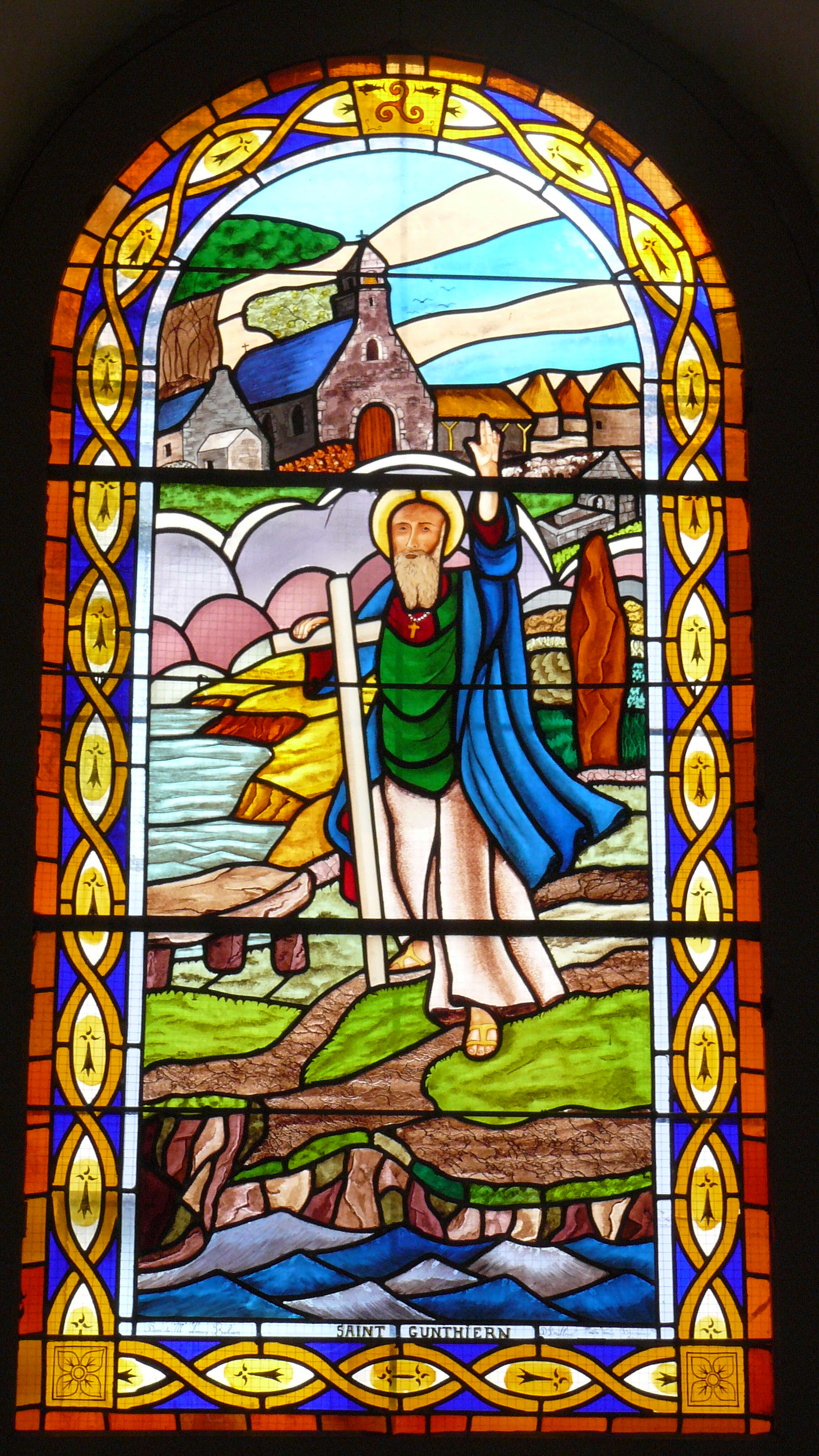 Vitrail de la chapelle de Notre Dame de Placemanec à Locmaria sur l'île de Groix.